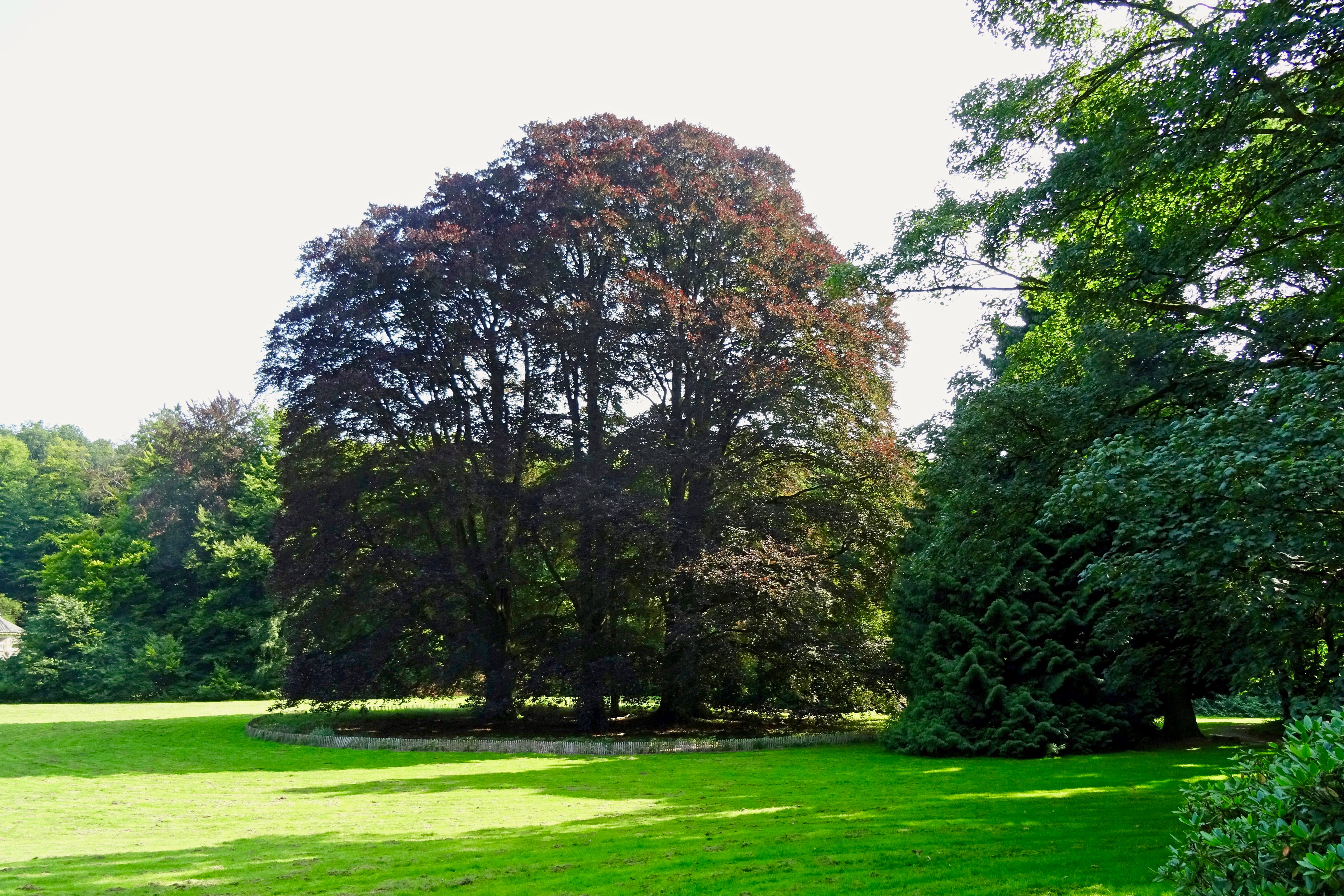 Monumentale beukengroep in het park bij het Huis Zypendaal te Arnhem